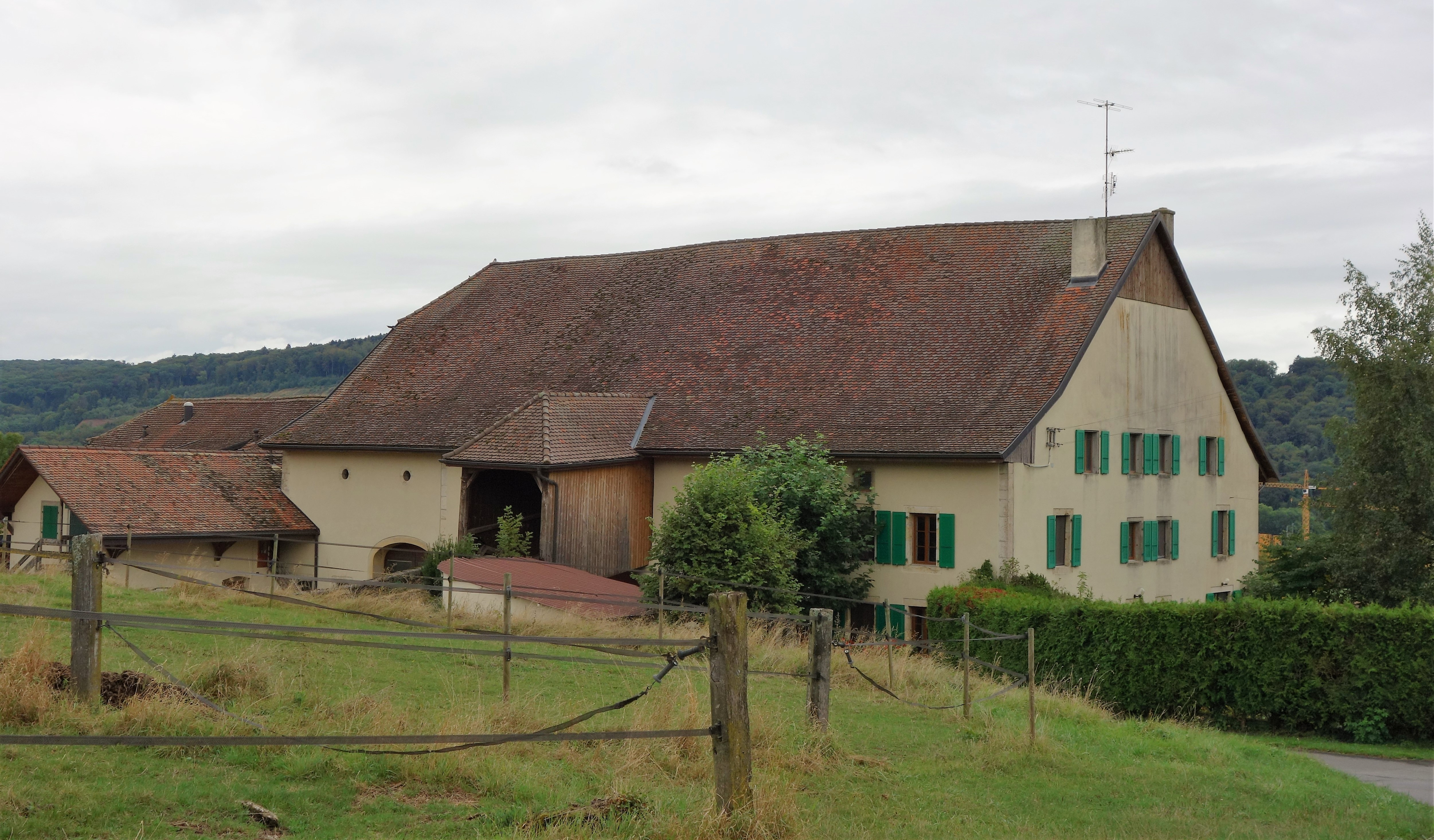 Lussery-Villars (canton de Vaud - Suisse) : vieille ferme (Villars)